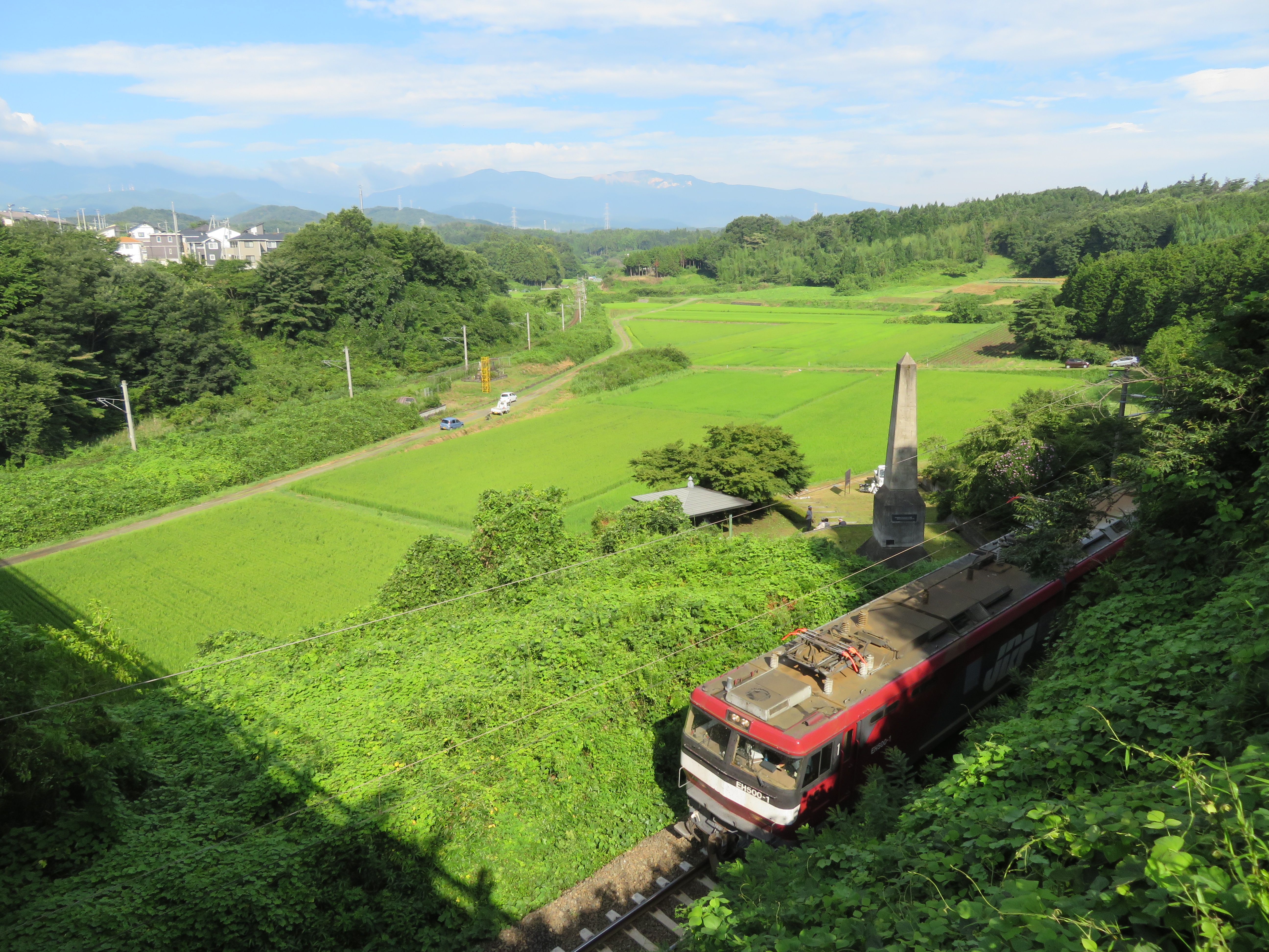 JR東北本線 松川駅ー金谷川駅間（羽山陸橋から撮影）